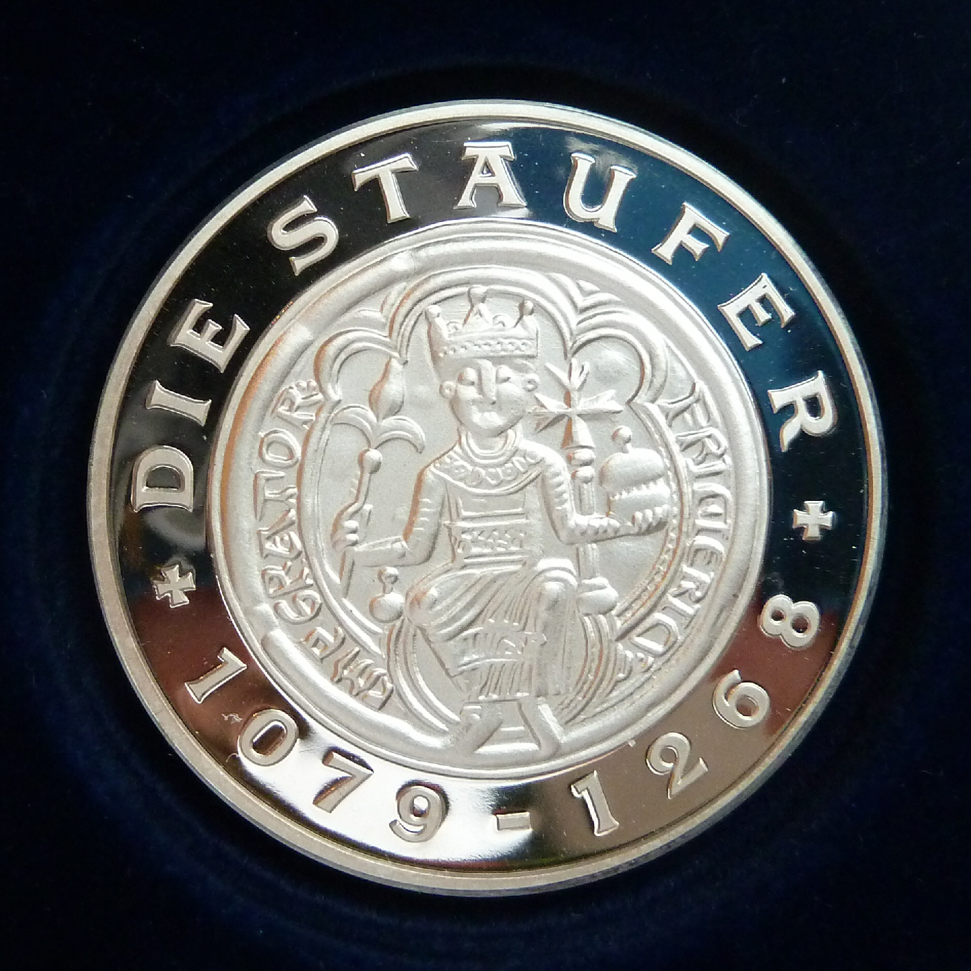 Ehrenmedaille des Ministerpräsidenten des Landes Baden-Württemberg (Vorderseite)